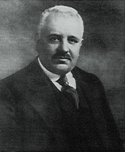 Francesco Saverio Nitti, immagine tratta dal sito